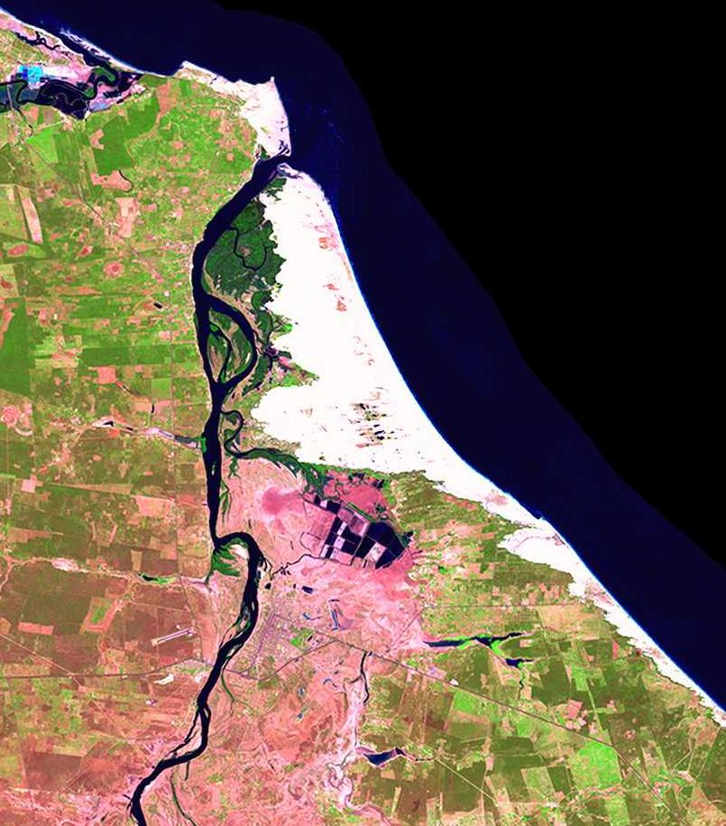 Foz do Rio Jaguaribe (Ceará, Brasil) no limite entre os municípios de Aracati e Fortim.